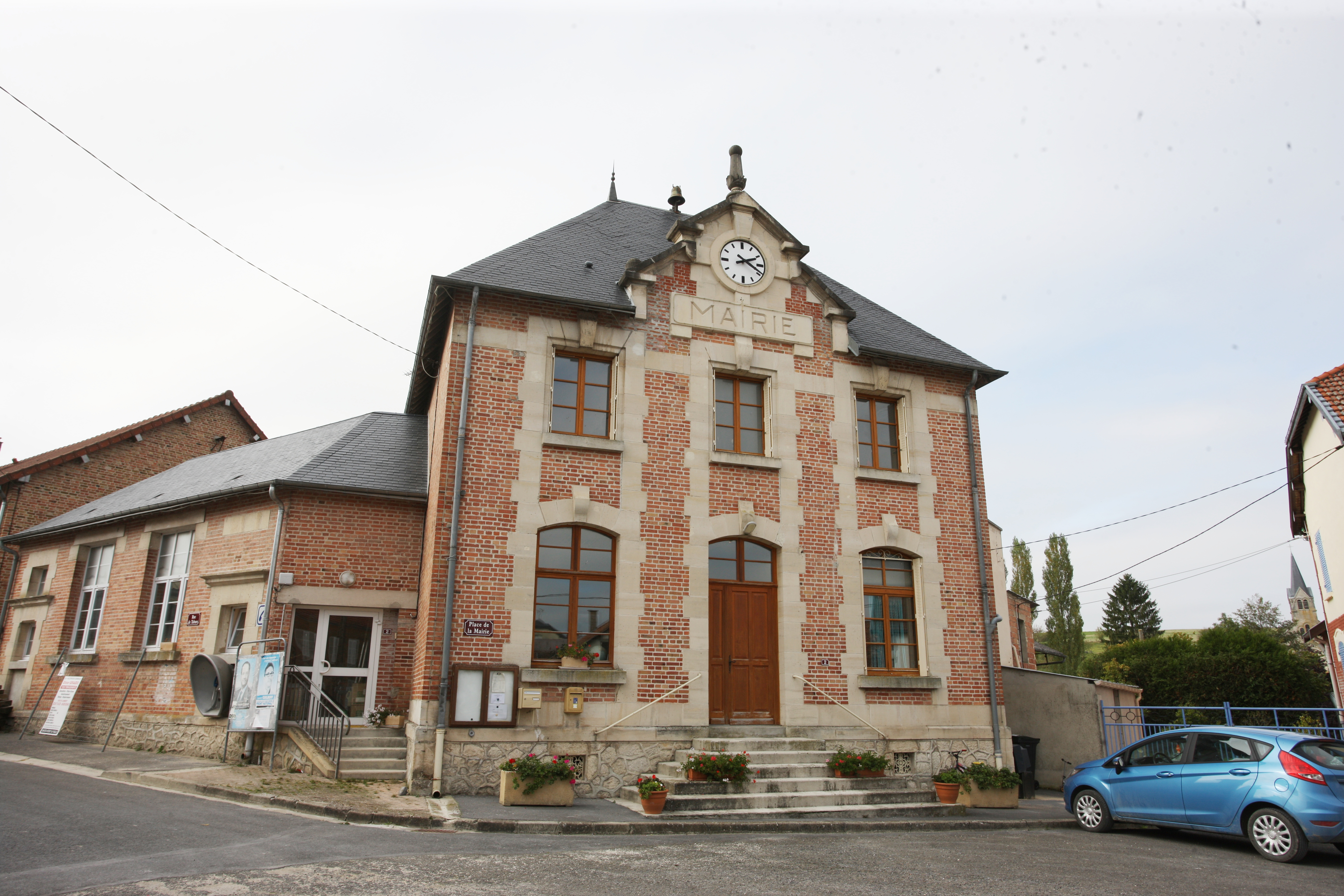 Village Ardennais